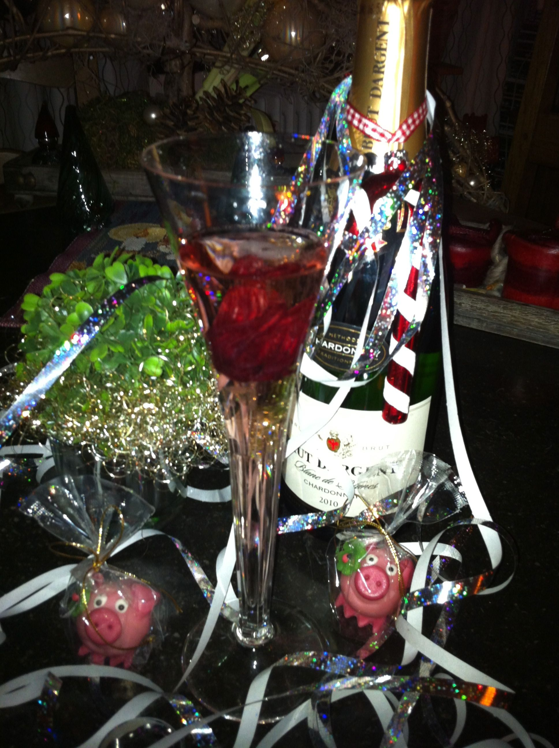 Prosit Neujahr